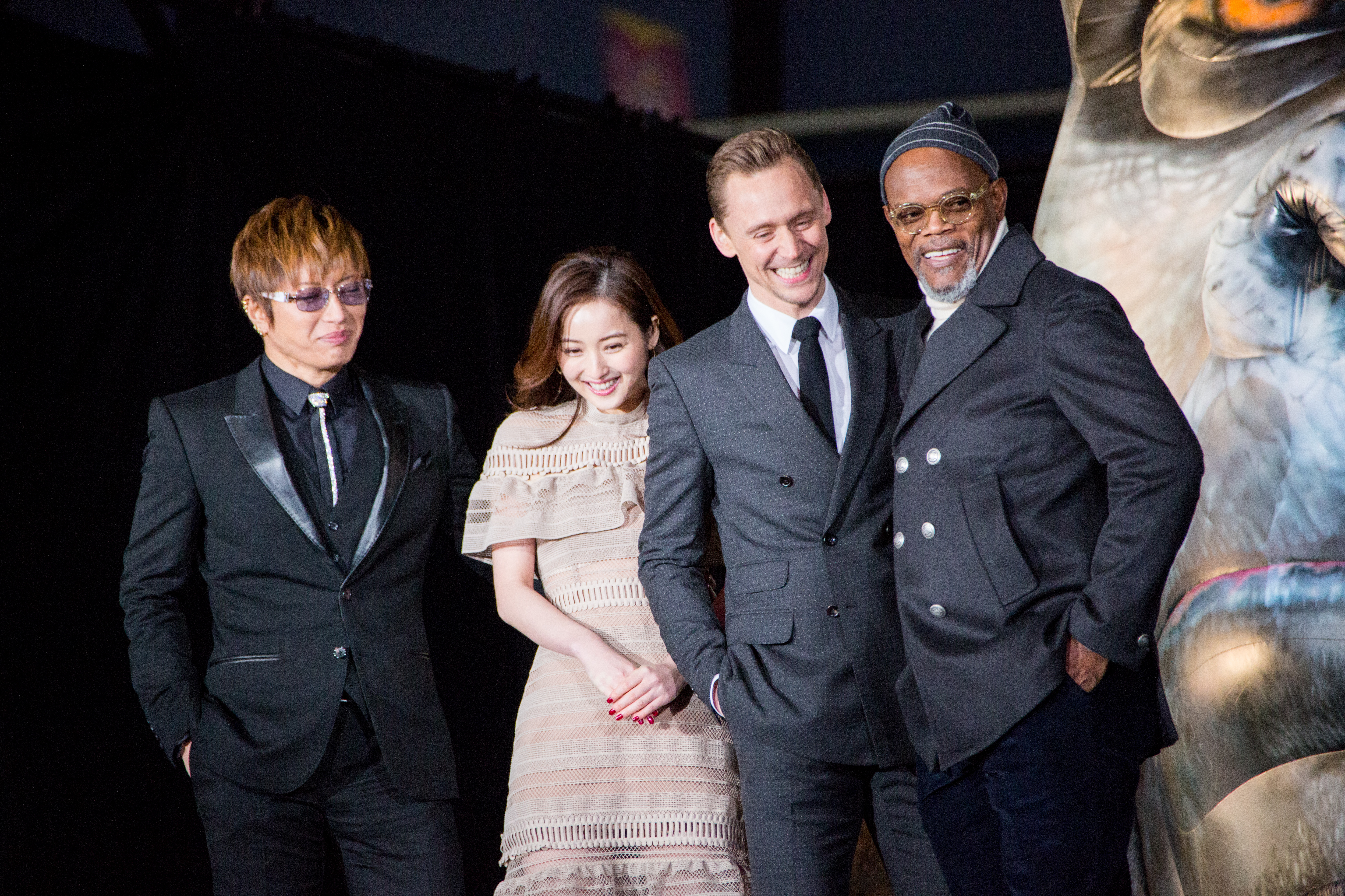 キングコング: 髑髏島の巨神 ジャパンプレミア レッドカーペット GACKT 佐々木希 トム・ヒドルストン サミュエル・L・ジャクソン